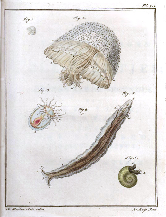 1 - 2. Een “parel-kwal” (Medusa perla), later herkend door van Benthem Jutting (1970) als de lichtende kwal (Pelagia noctiluca). 3. De “kermin beroë” (Mollusca marina), later herkend door van Benthem Jutting (1970) als het kwalstadium van een poliep (T. polycirrha). 4 – 5. Een “dier onder de rang der slakken of molluscae”, later herkend door van Benthem Jutting (1970) als een borstelworm (Histriobdella homari), maar deze identificatie is onzeker (Kristian Fauchald, Smithsonian Institution). 6. Een “slakhoorn” (Helix), later herkend door van Benthem Jutting (1970) als een kokerworm (Spirorbis sp.).